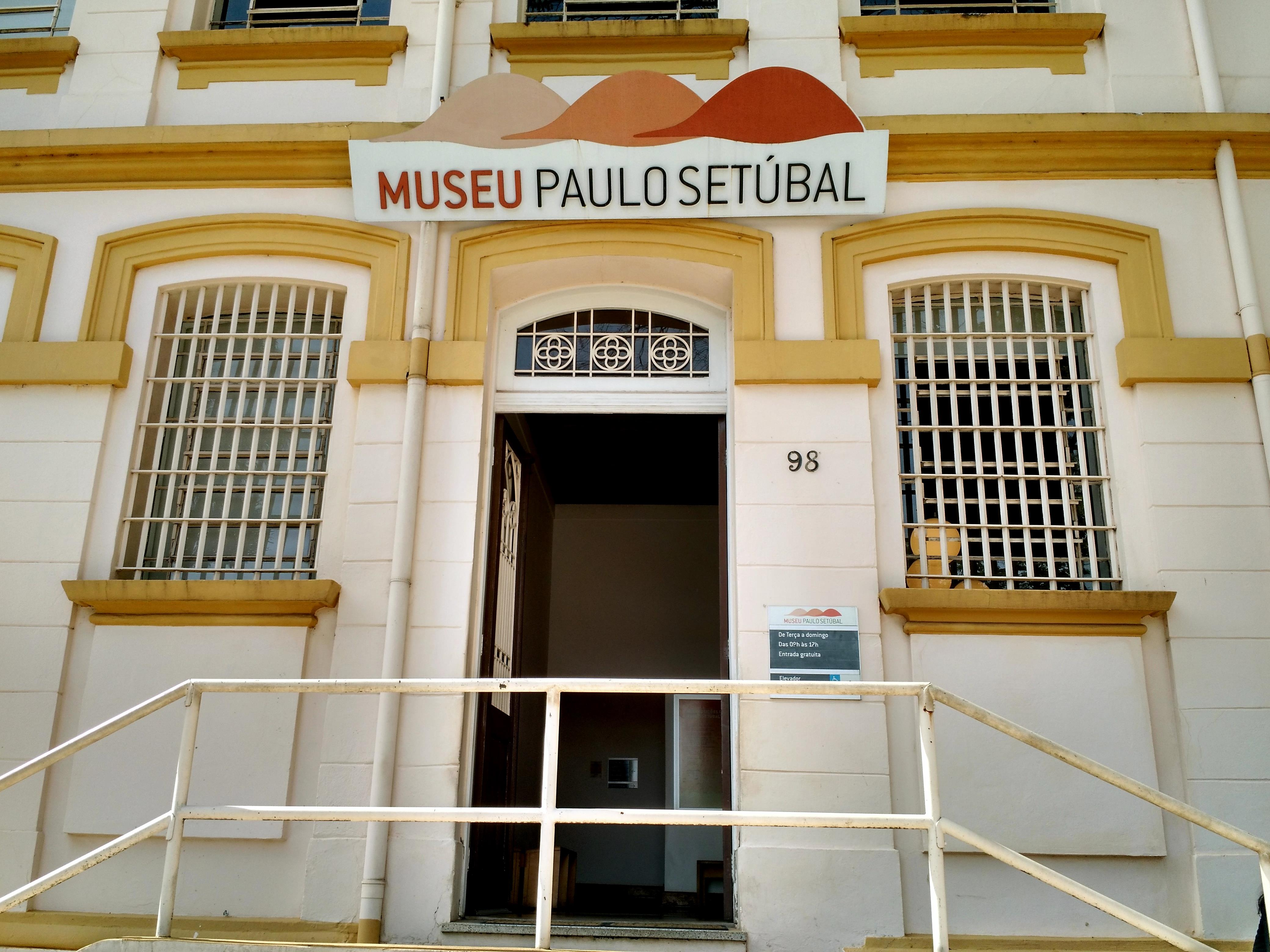 Entrada do edifício.